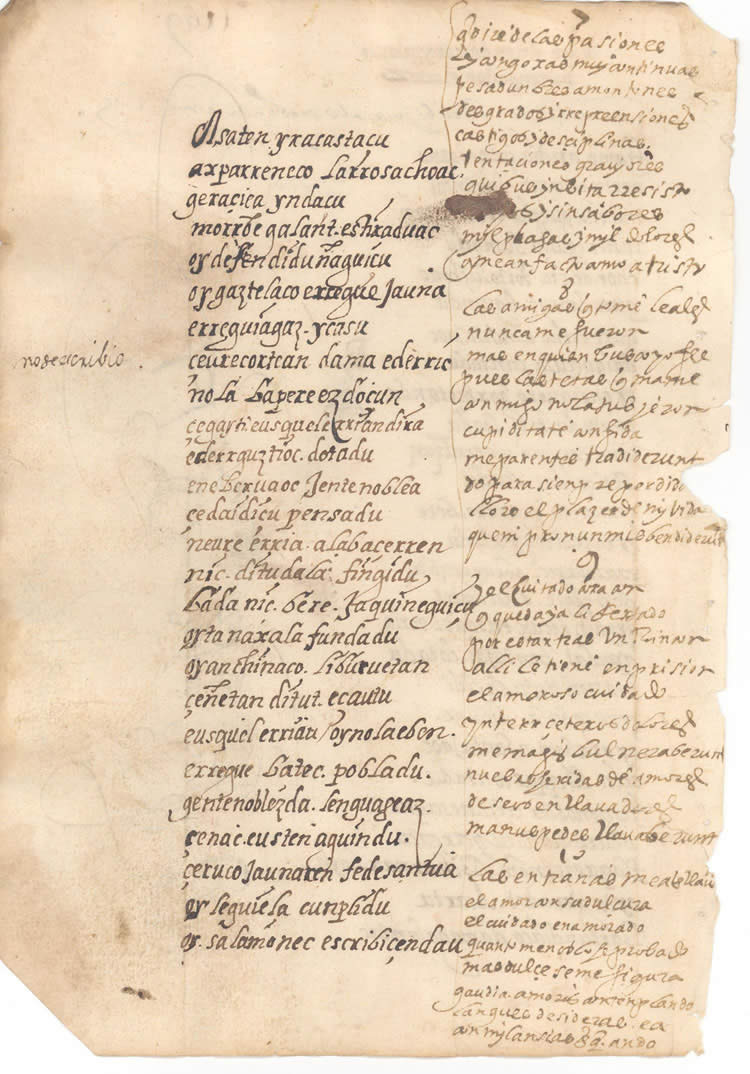 Joan Perez de Lazarragaren eskuizkribuaren 18. orriaren atzealdea.